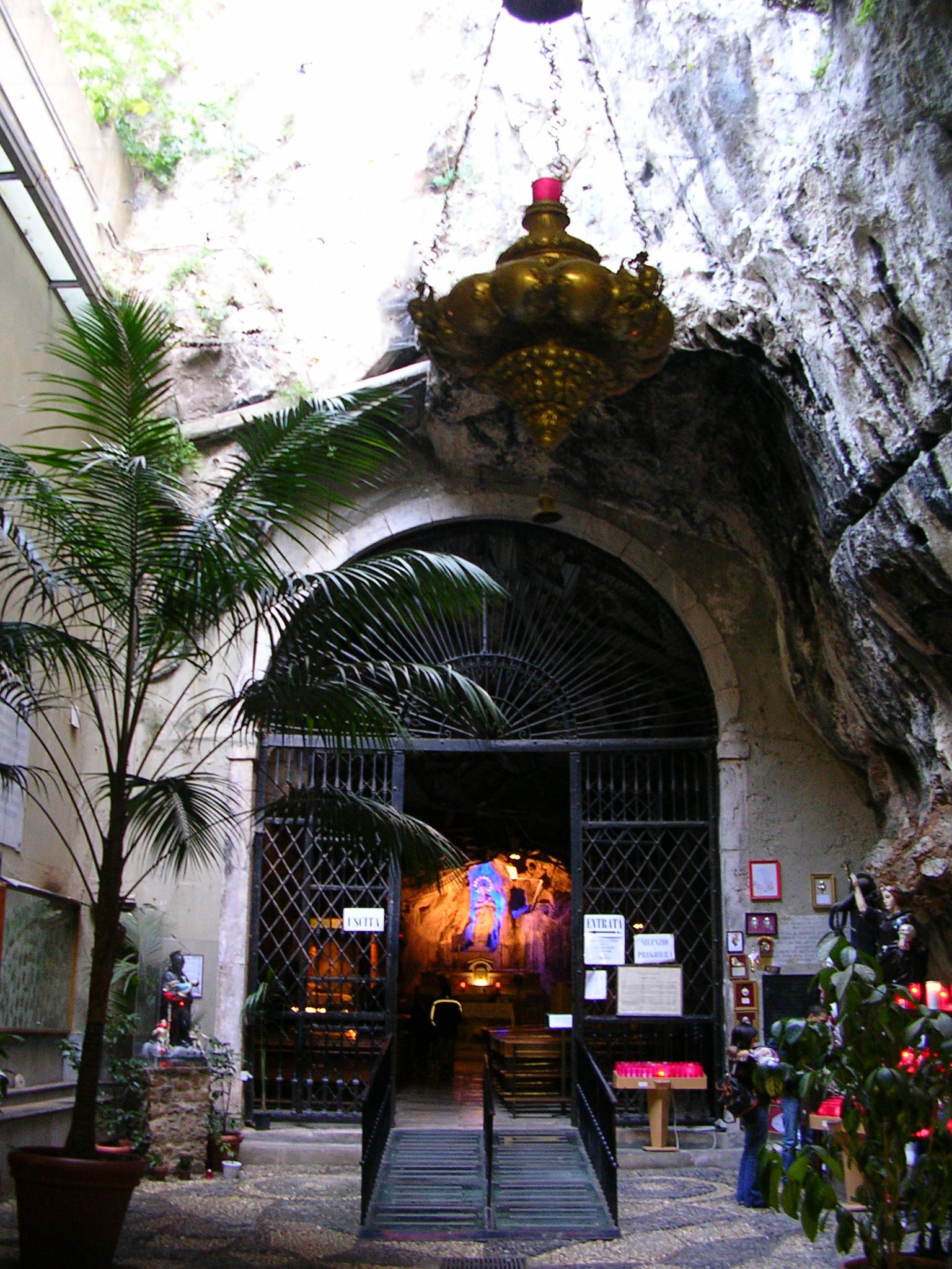 Interno del Santuario di Santa Rosalia - Palermo - Sicily - Italy